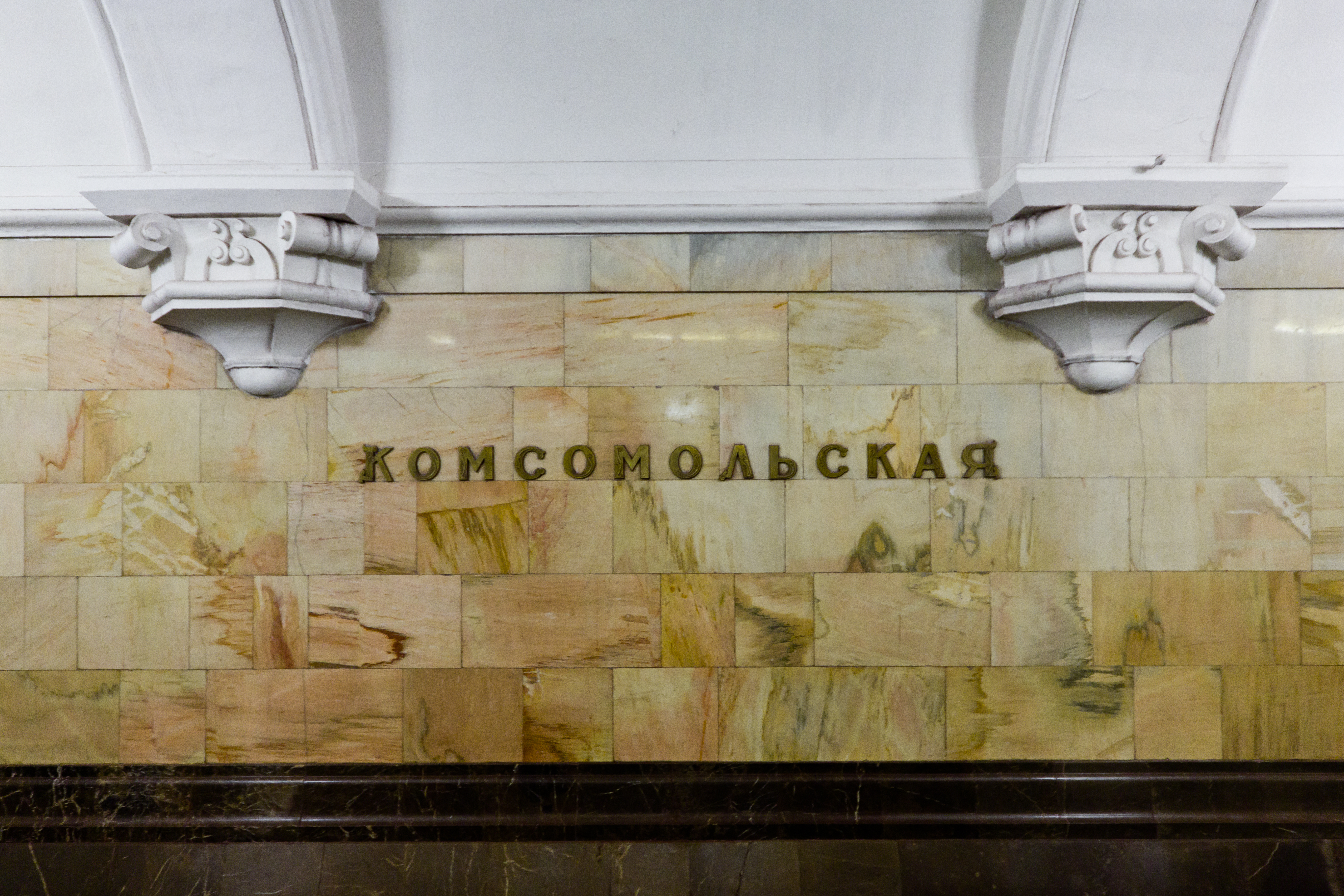 Комсомольская (станция метро, Кольцевая линия)